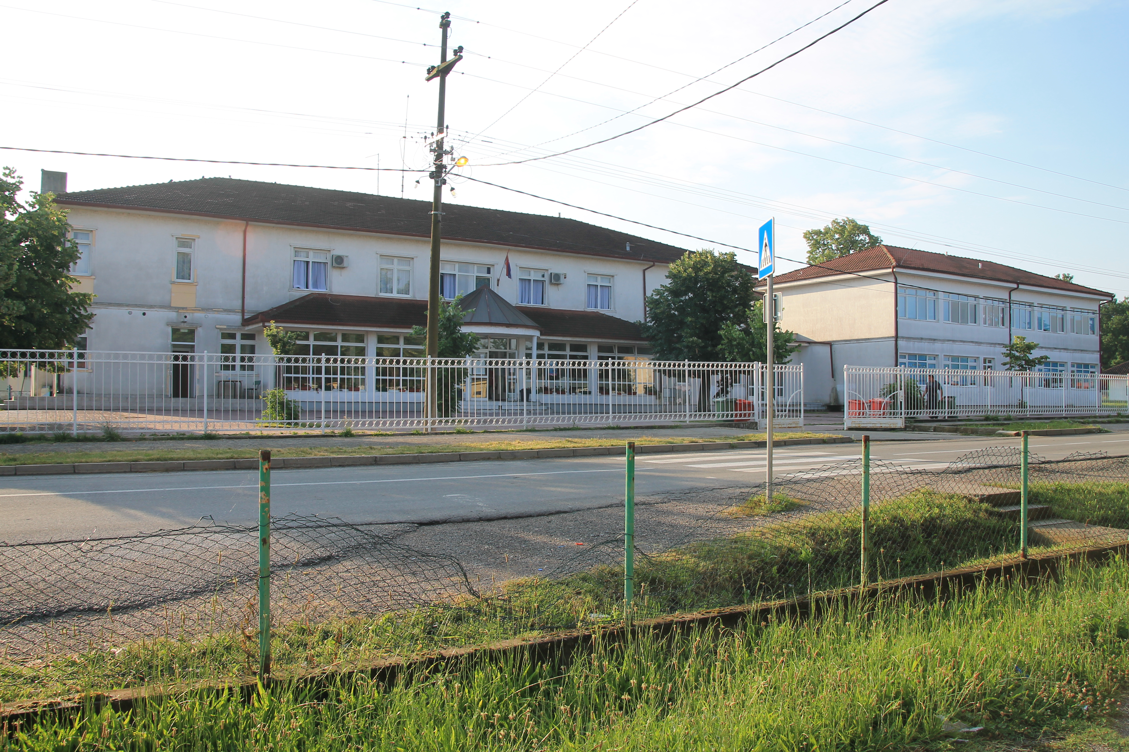 Osnovna škola u Draževcu